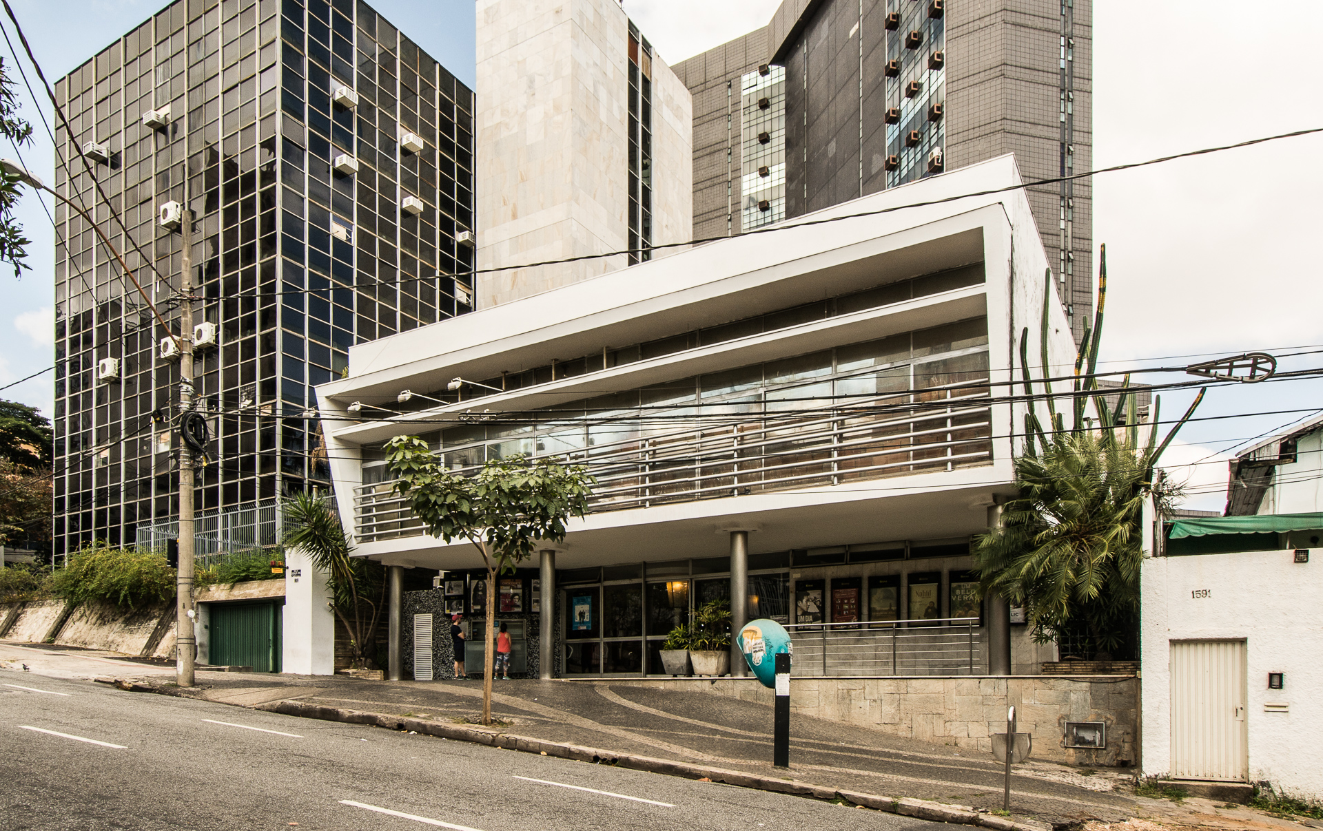 Cine Belas Artes (originalmente sede do DCE da UFMG). Projeto de Sylvio de Vasconcellos. 1953.